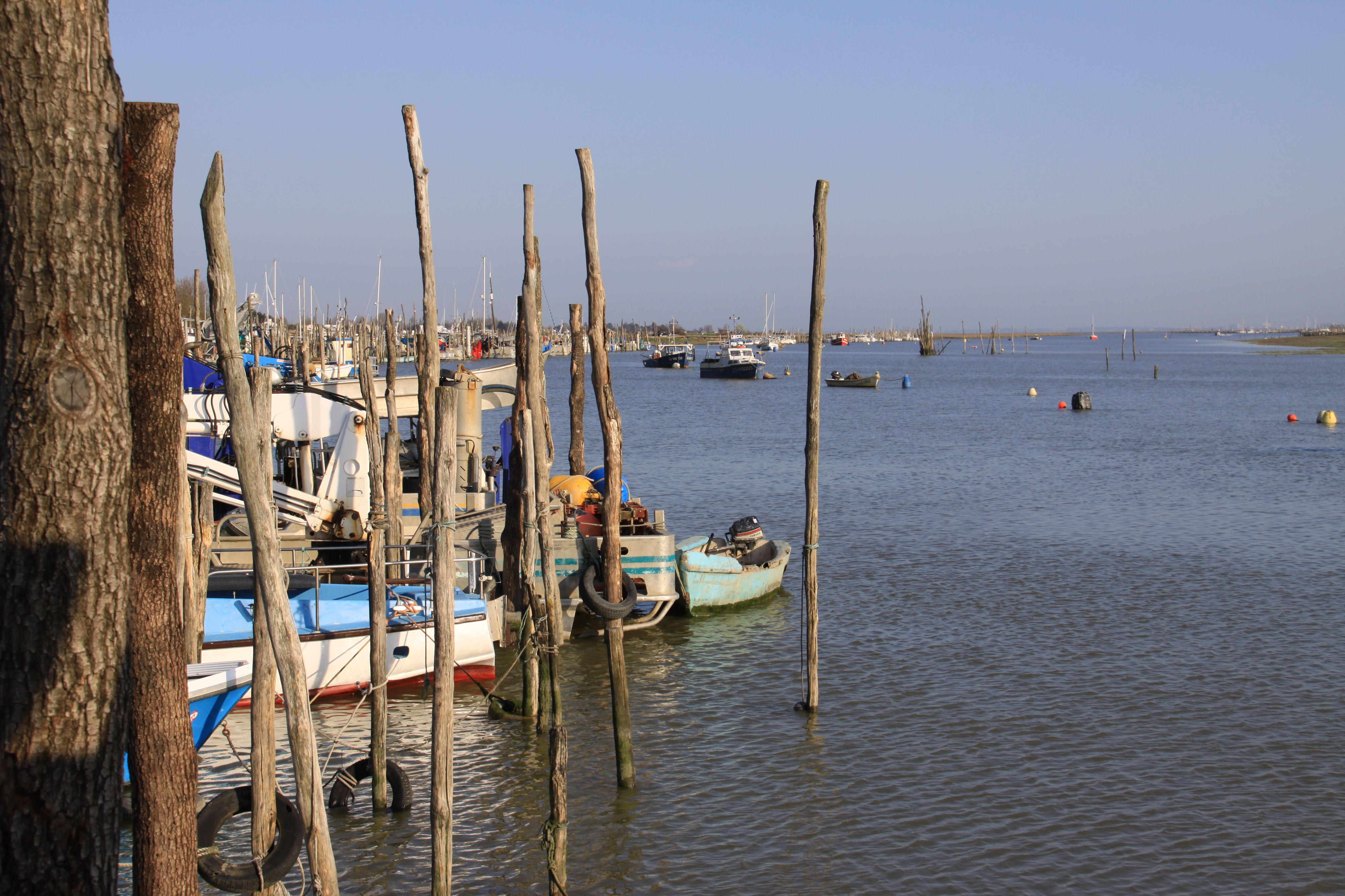 La courbure du port de L' Aiguillon-sur-Mer. Au premier plan, sont les pieux qui délimitent les emplacements des bateaux. L' Aiguillon-sur-Mer, Vendée, France.